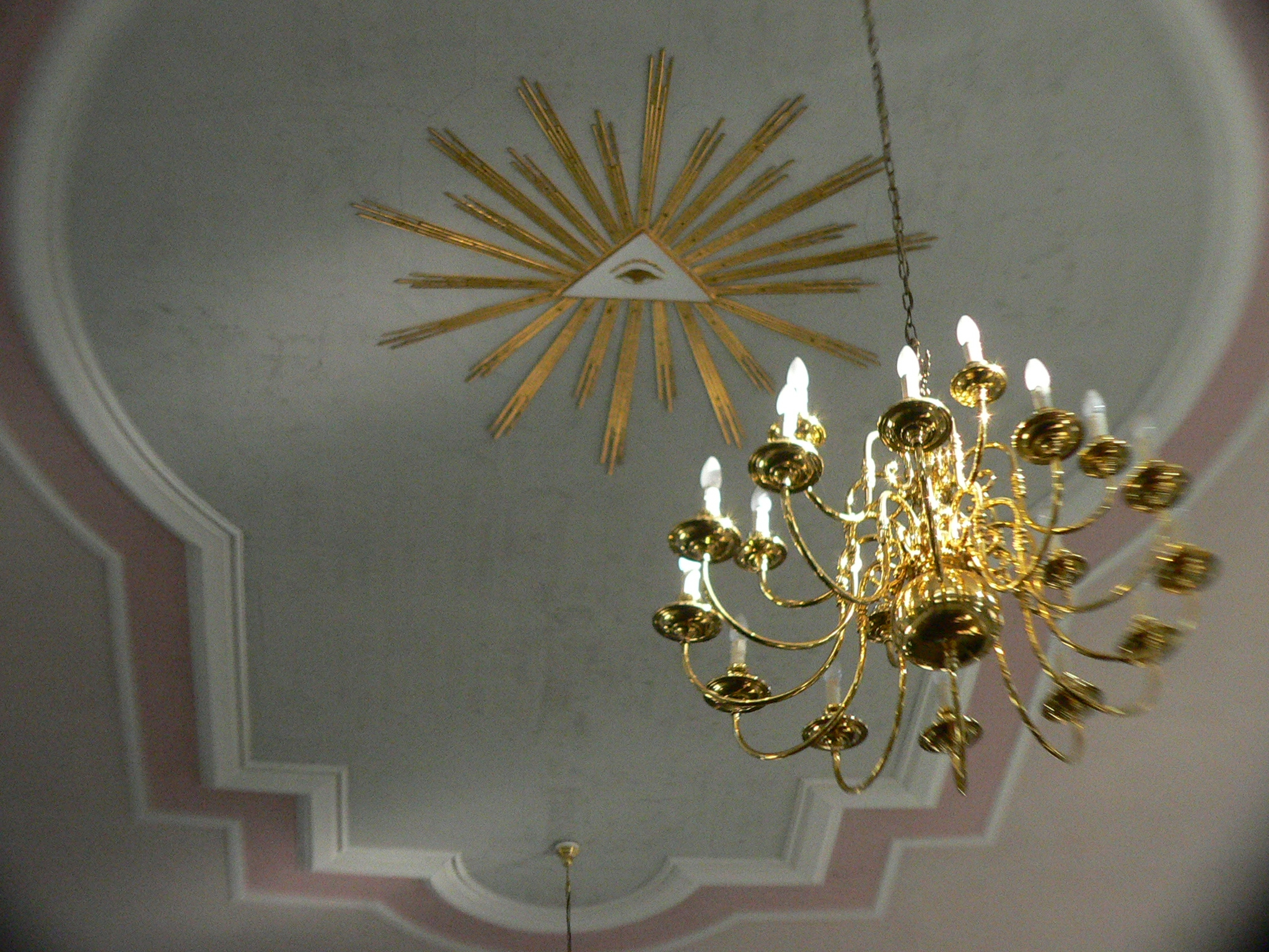 Gauerstadt, evangelische Kirche, Decke